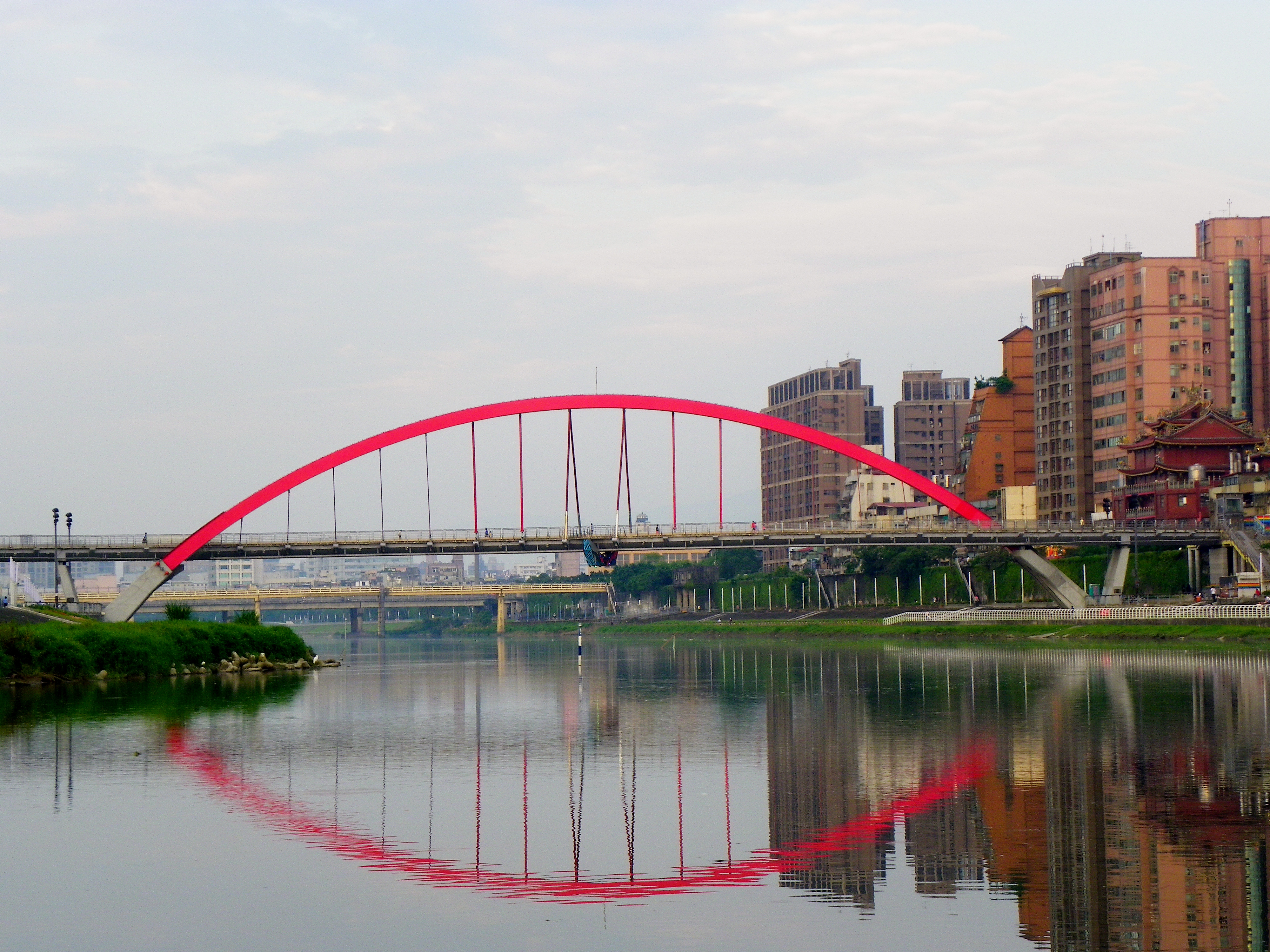 跨基隆河聯絡臺北市內湖區新明路底與松山區饒河街的彩虹橋，遠方是成美長壽橋，攝於花博5號遊艇。